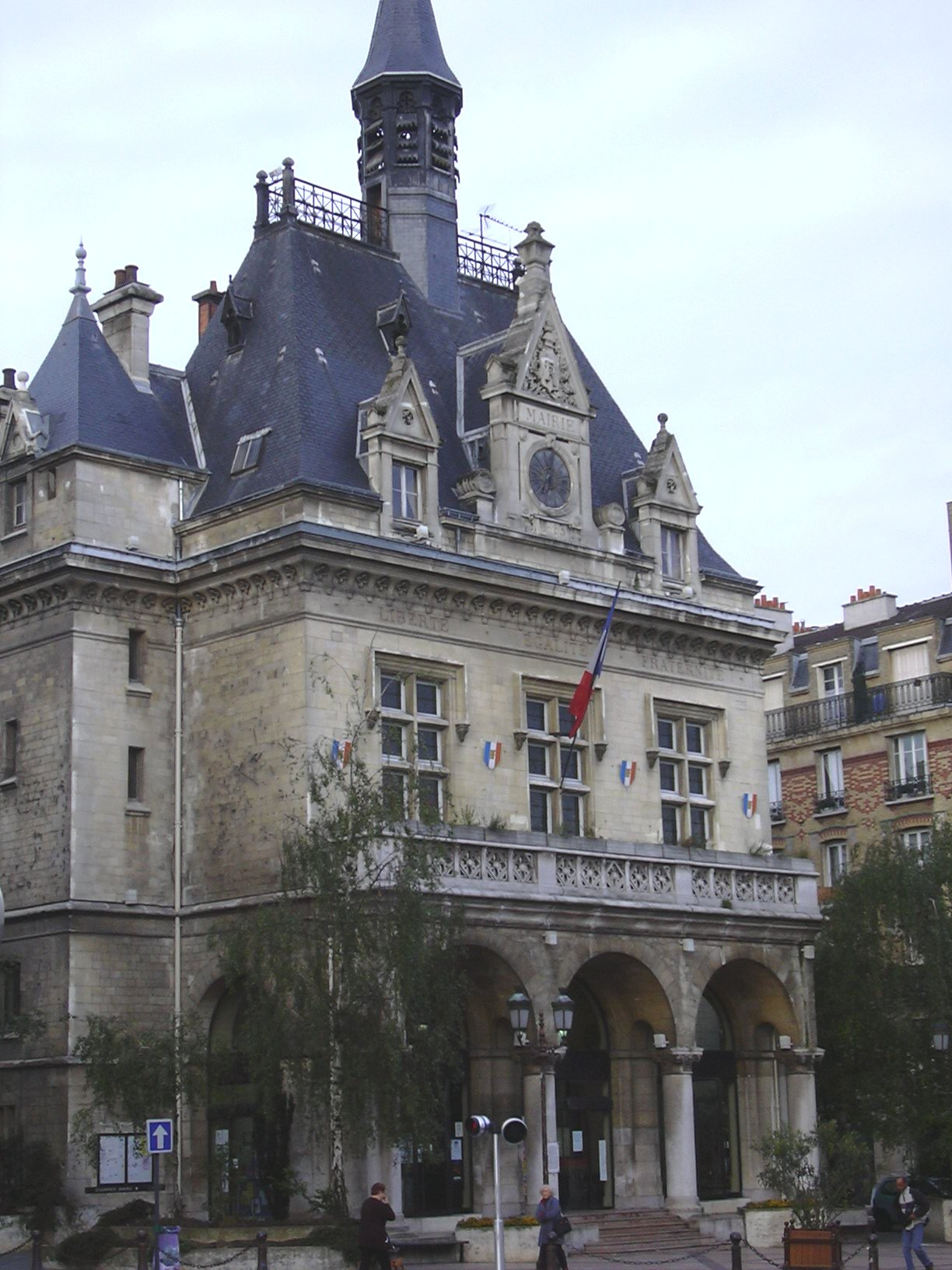 Mairie des lilas 93260 FRANCE